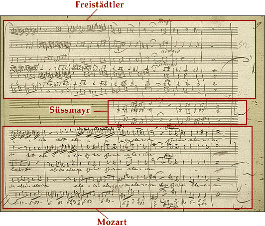 Partition du Kyrie